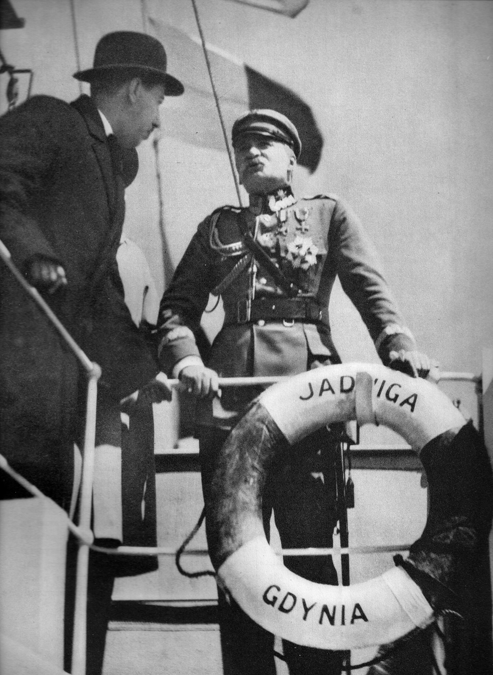 Marszałek Józef Fiłsudski i min. Eugeniusz Kwiatkowski zwiedzają port w Gdyni z pokładu statku pasażerskiego żeglugi przybrzeżnej Jadwiga (nazwa Jadwiga podobnie jak nazwa siostrzanego statku Wanda pochodziły od córek marszałka Piłsudskiego)